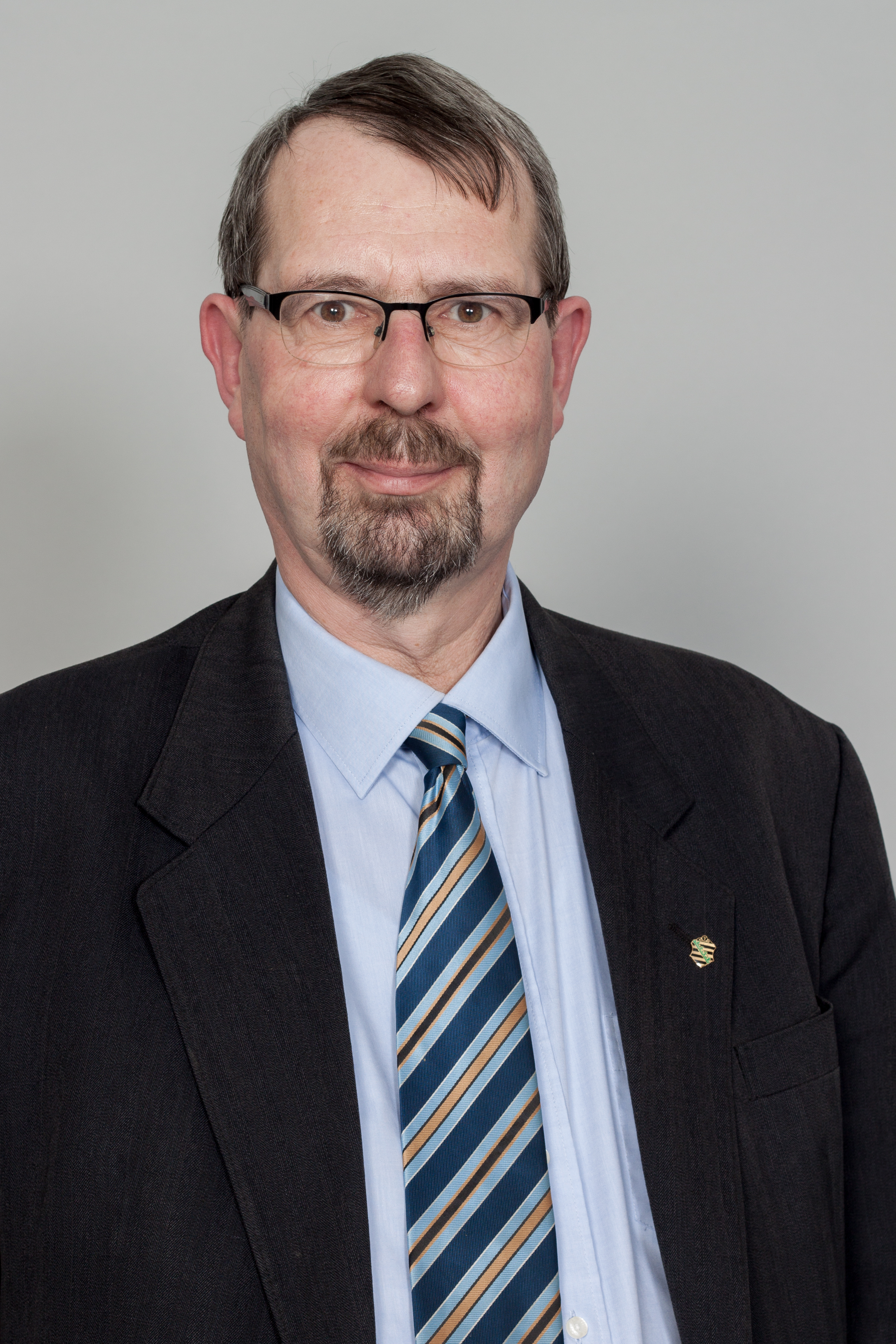 Abgeordneter des Sächsischen Landtages Volker Tiefensee